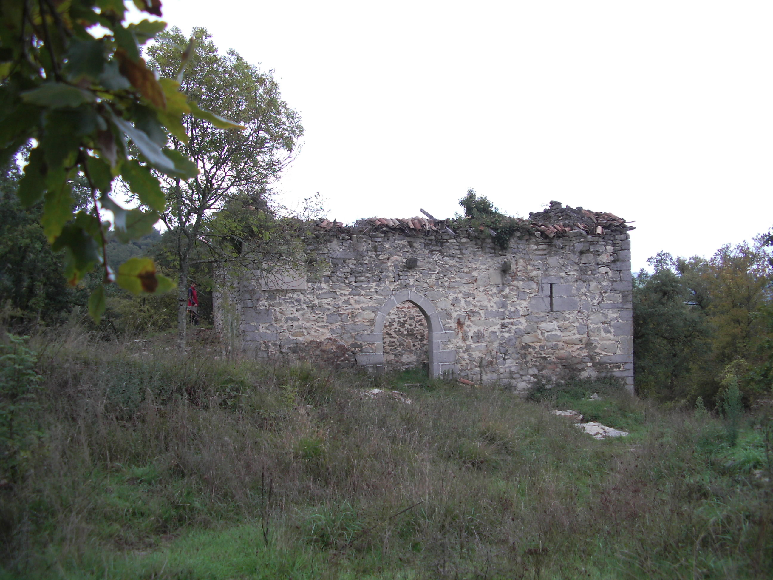 San Clemente de Erbiletako baseleiza (Lendoño goikoa-Orduña)